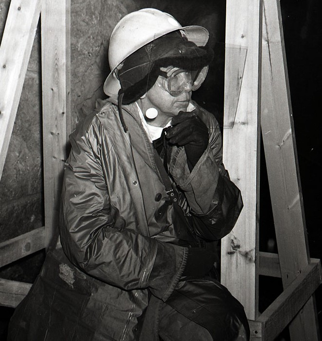 Siri Derkert med arbetet för "Ristningar i Betong" i Östermalms tunnelbanestation, 1962